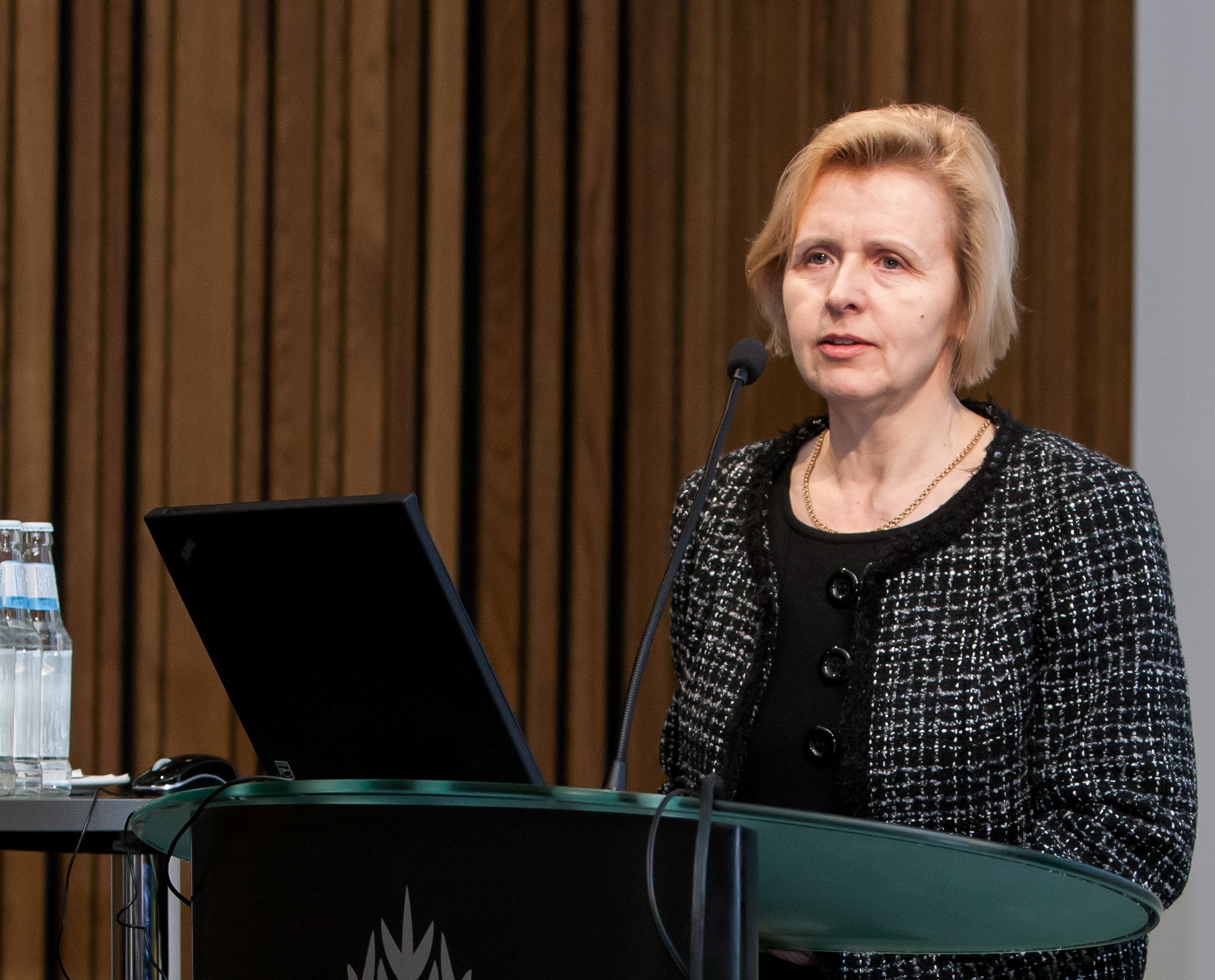 29.–30. märtsil 2012 toimusid Dorpati konverentsikeskuses Eesti Arstide Päevad 2012. Pildil dr Mai Rosenberg (Tartu Ülikooli Sisekliinik) konverentsi 2. päeval.